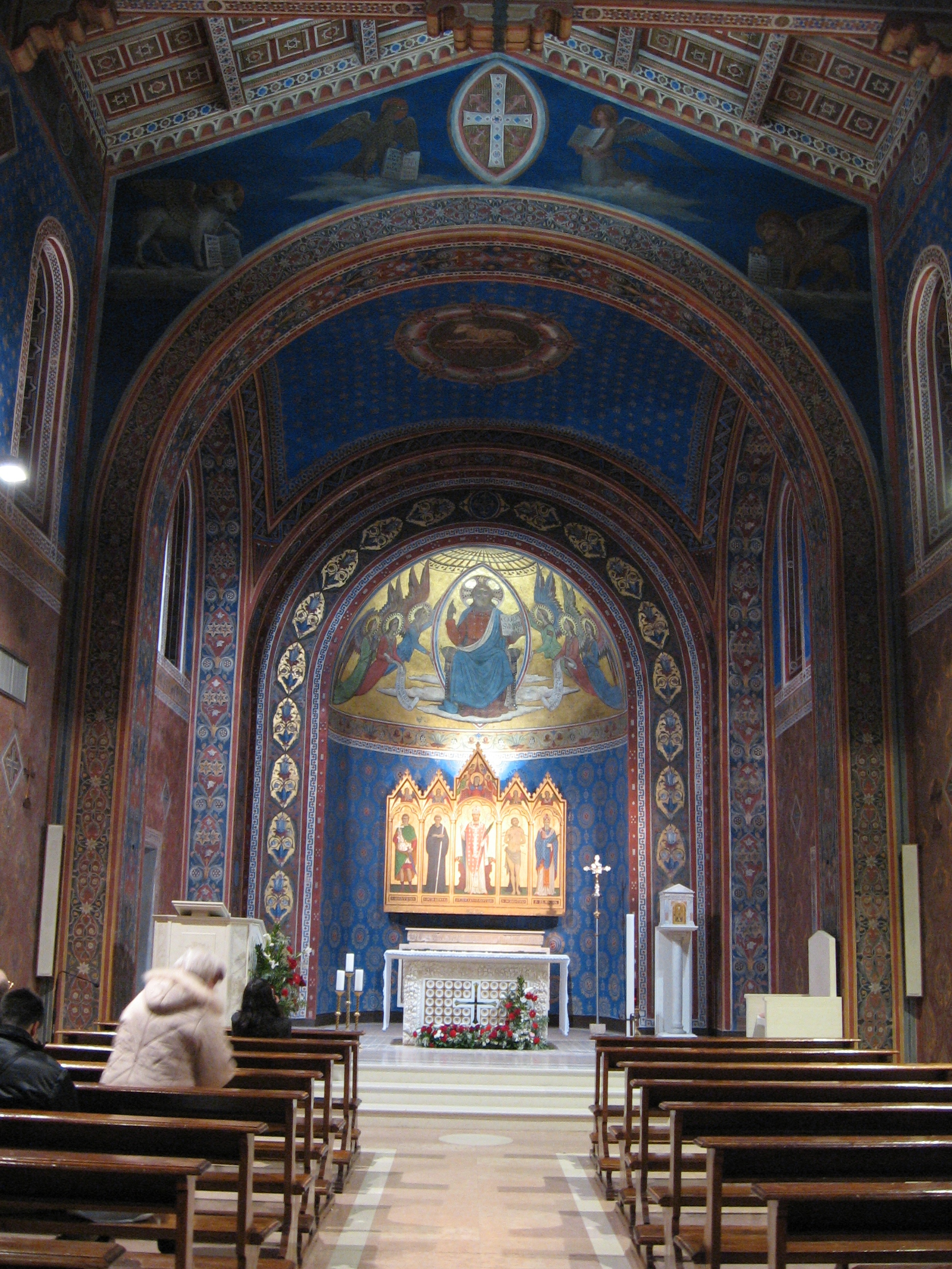 Chiesa di San Costanzo a Perugia - Interno